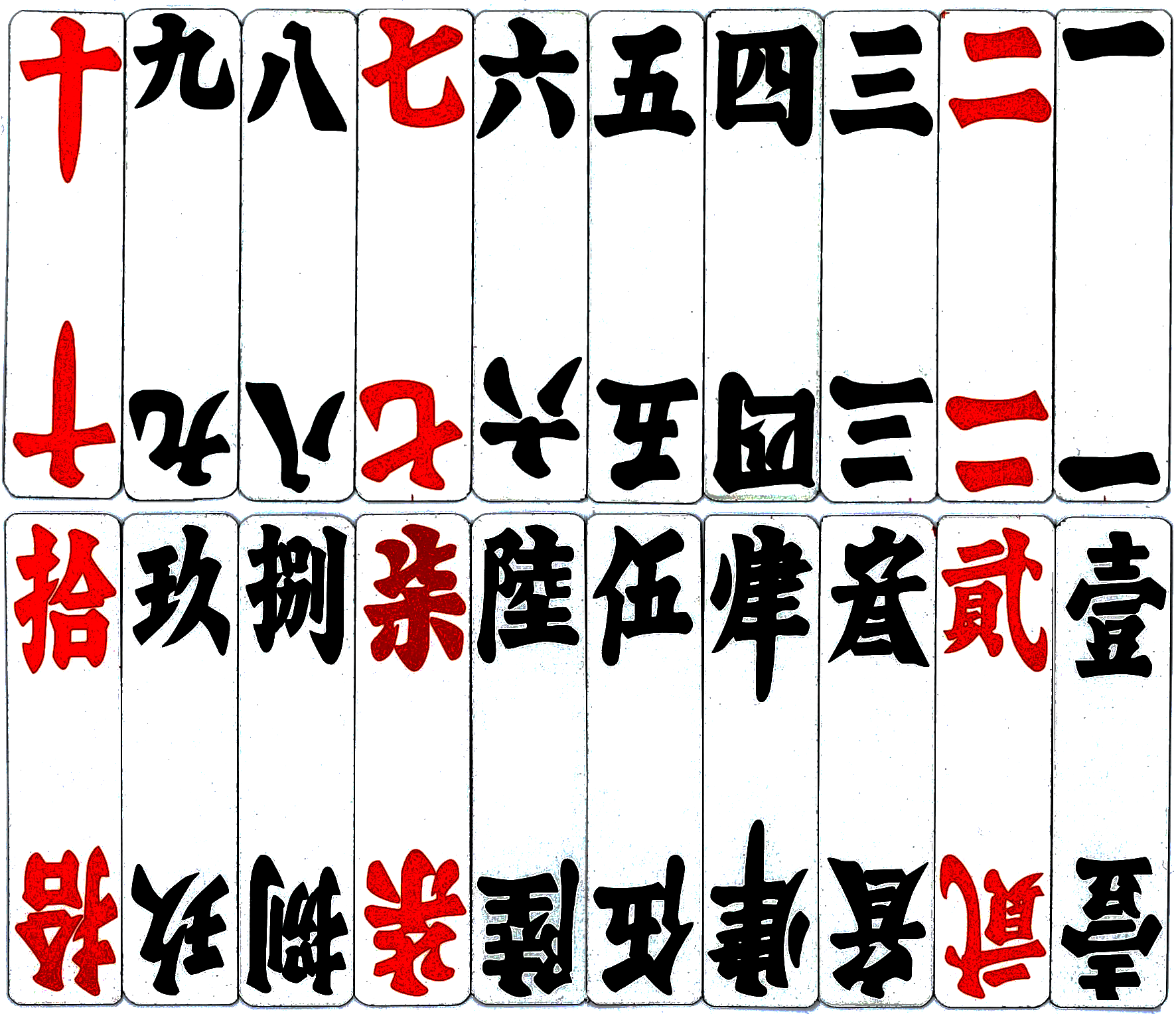 中文（台灣）: 湖南的字牌